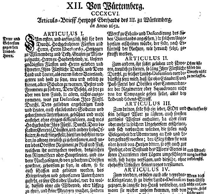 Beispiel für den Text eines Artikelsbriefes